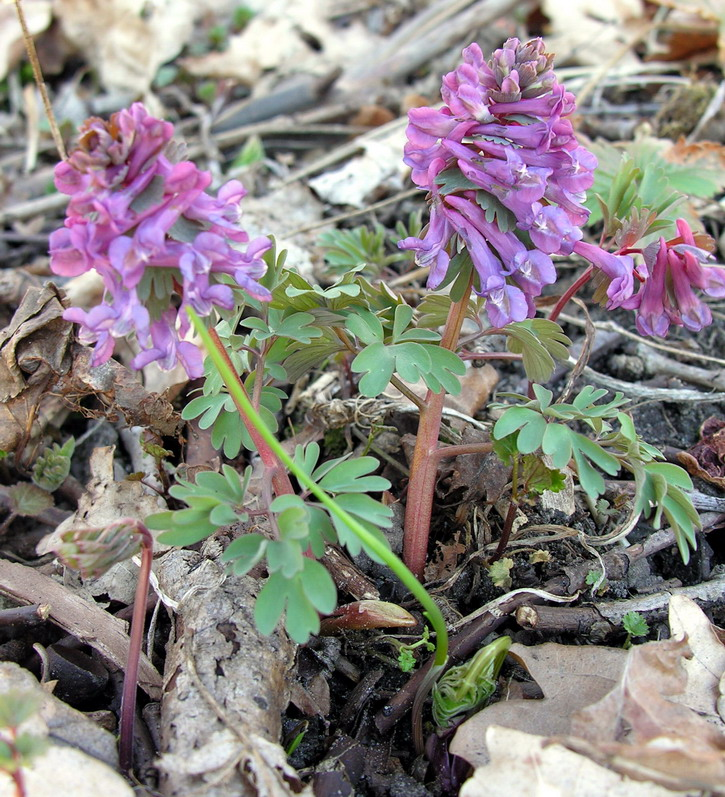 Paprastasis rūtenis (Corydalis solida) Šeima. Žvirbliarūtiniai (Fumariaceae) Fotografavo: Algirdas, 2006 m. baland?io 23 d.